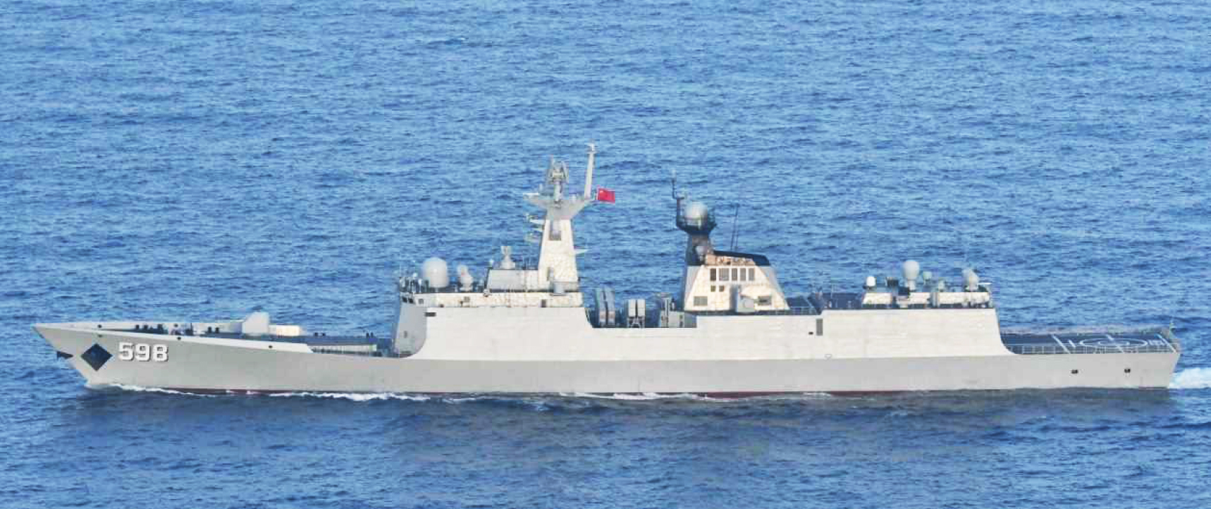 ７月２５日（木）午前５時頃、海上自衛隊第５航空群所属「Ｐ－３Ｃ」（那覇） 及び佐世保地方隊所属「あまくさ」（佐世保）が、宮古島の北約２４０ｋｍの海 域を南下する中国海軍ルーヤンⅢ級ミサイル駆逐艦１隻、ジャンカイⅡ級フリ ゲート２隻及びフユ級高速戦闘支援艦１隻の計４隻を確認した。 その後、これらの艦艇が沖縄本島と宮古島の間の海域を南下し、太平洋へ向け て航行したことを確認した。